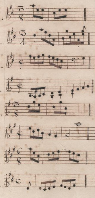 Table du volume V des manuscrits de Venise (incipit des sonates 15 à 22, K. 280 à 287).